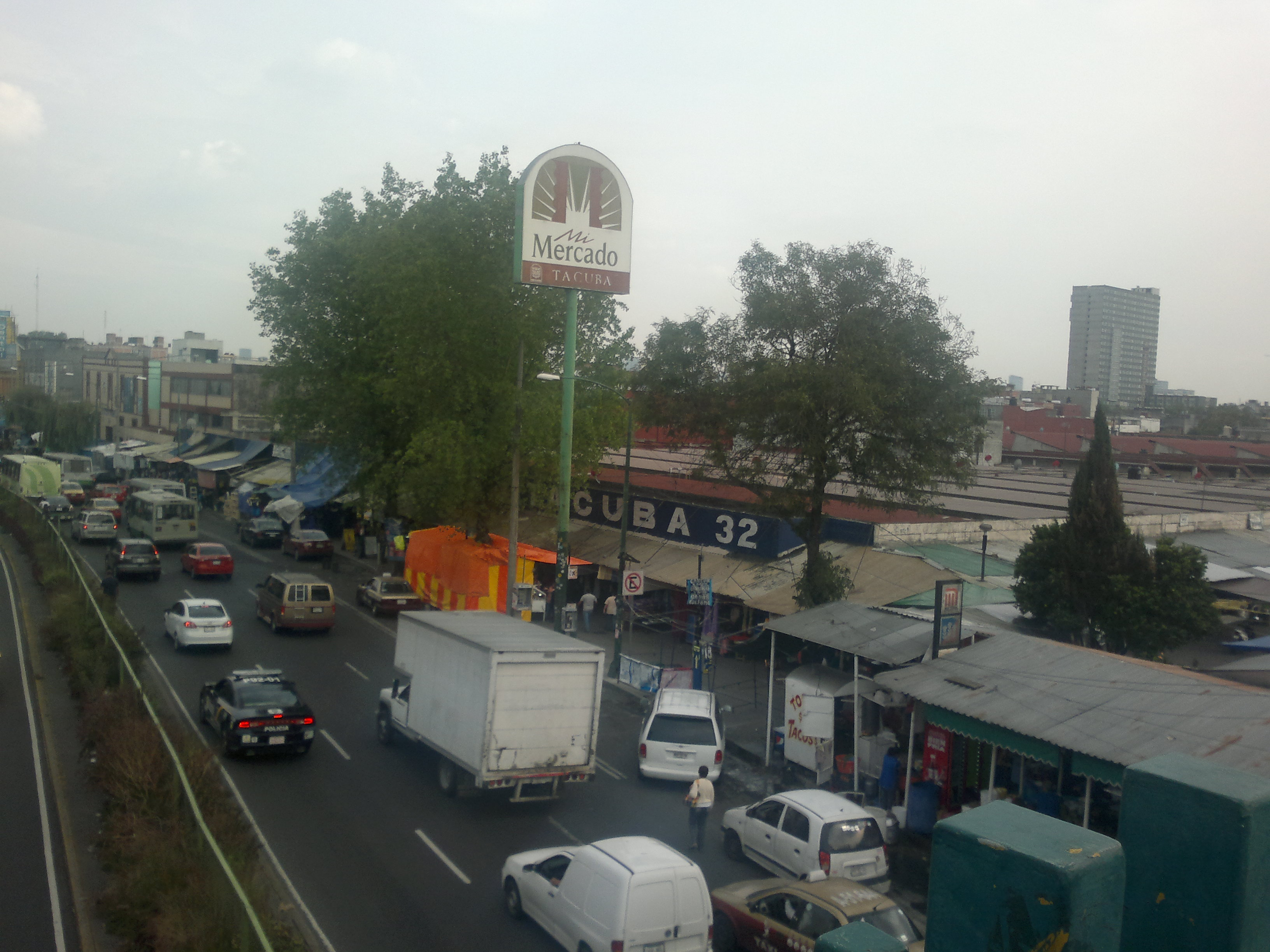 Ubicado en la Calzada México- Tacuba, Delegación Miguel Hidalgo; a la altura del metro Tacuba.